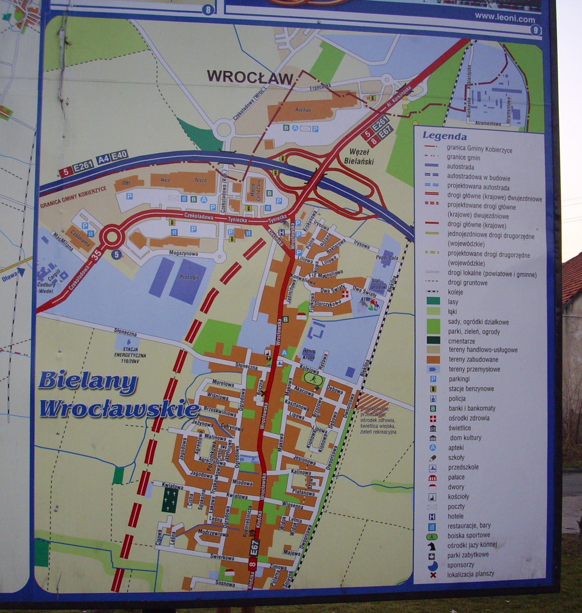 Bielany Wrocławskie. Mapa.